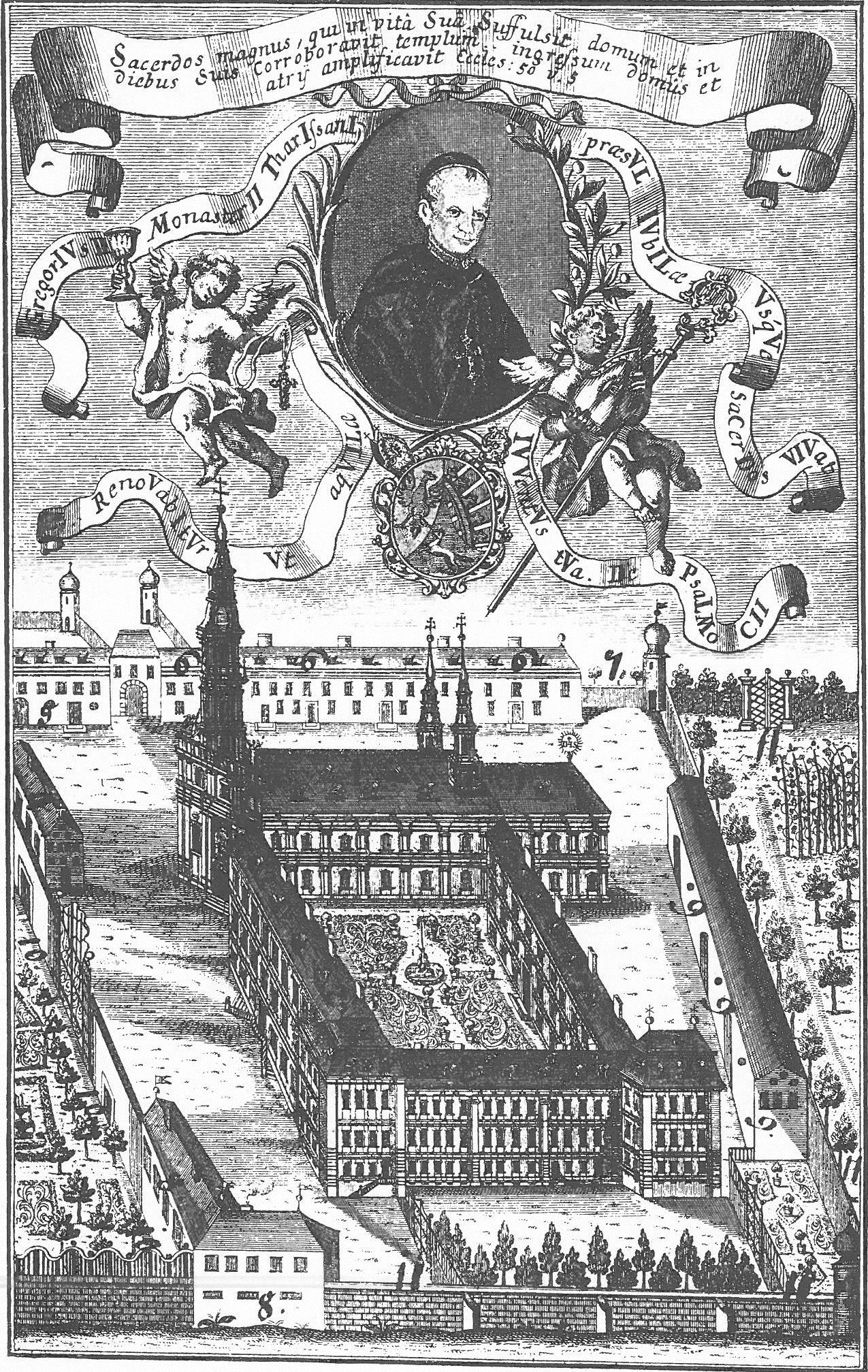 Gregor II. Fuchs, Abt von Theres (1715-1755)